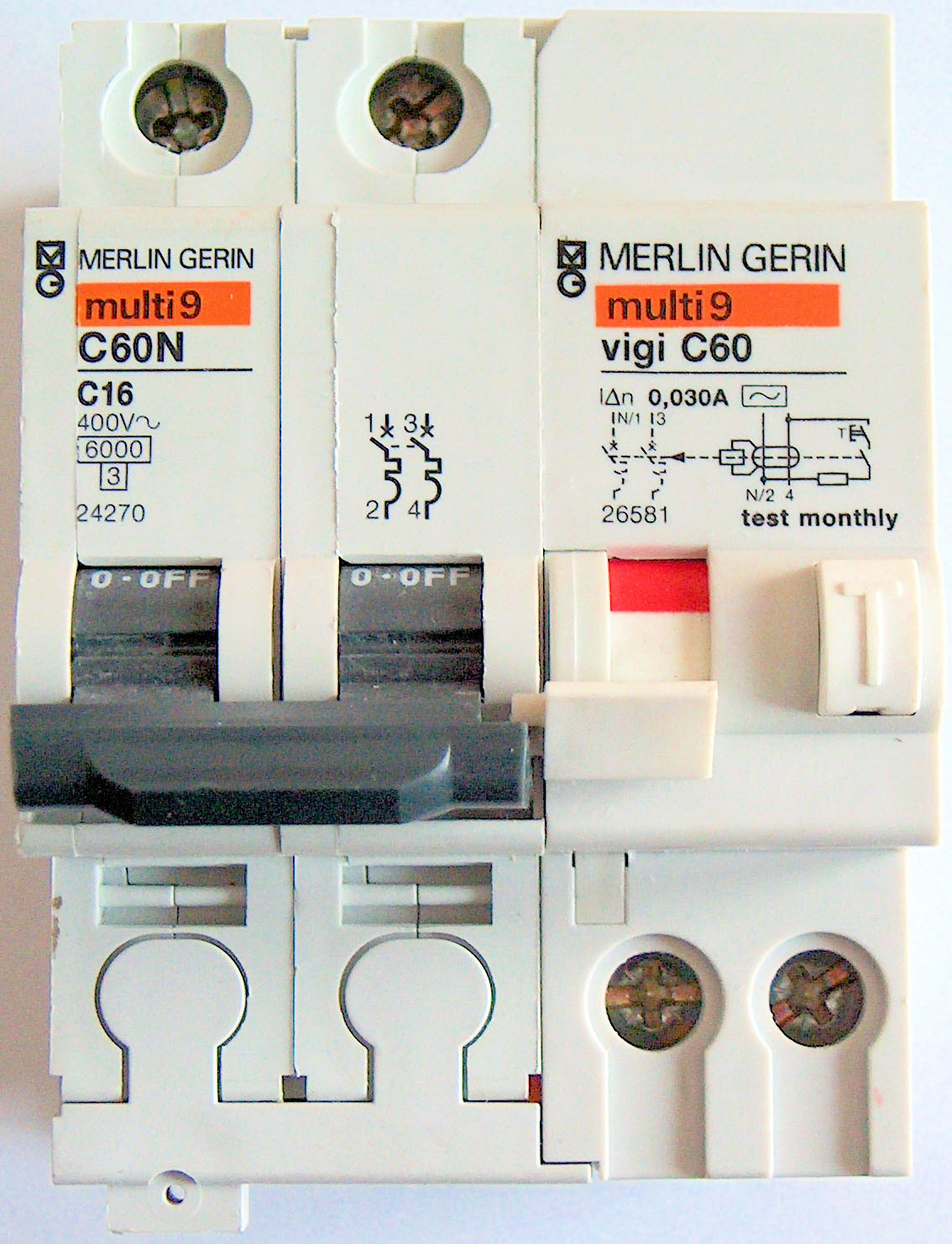 Interruttore magnetotermico con differenziale incorporato bipolare